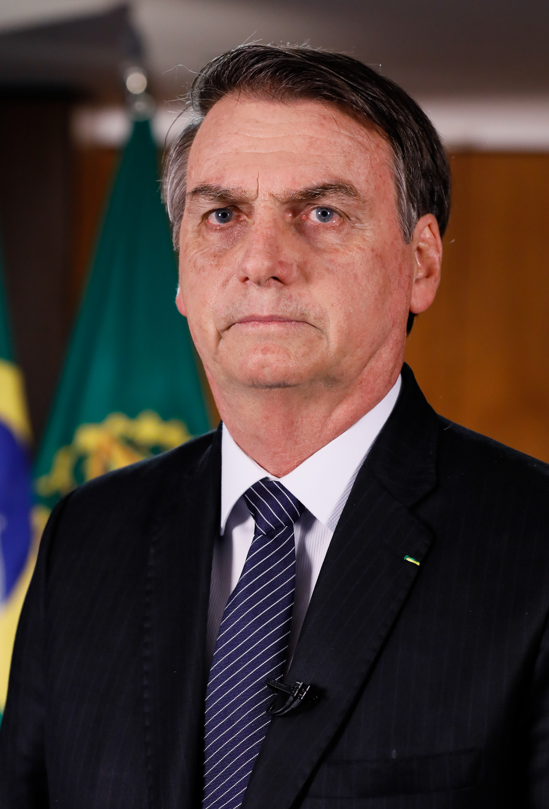 (Brasília - DF, 24/04/2019) Pronunciamento do Presidente da República, Jair Bolsonaro.